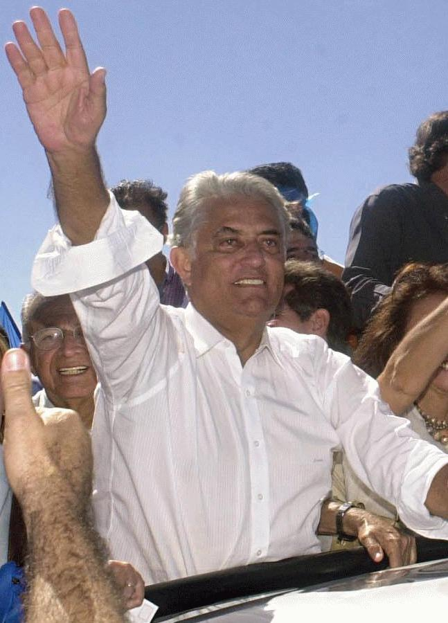 Brasília, 15/6/2003 (Agência Brasil - ABr) - Governador do DF, Joaquim Roriz, e a vice, Maria de Lourdes Abadia (exibindo o prêmio recebido na Pensilvânia), durante a carreata do Aeroporto Internacional de Brasília até a Ponte JK. (Foto: Marcello Casal Jr/ABr-hor 16)